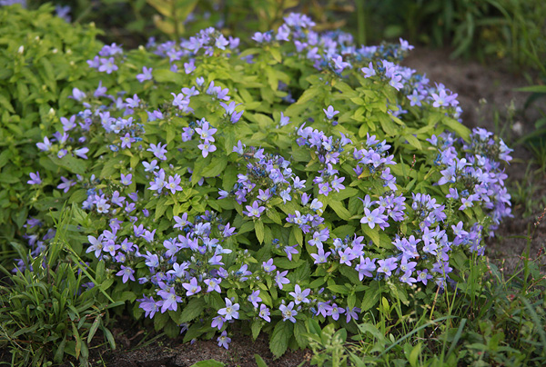 Колокольчик молочноцветковый 'Pouffe'